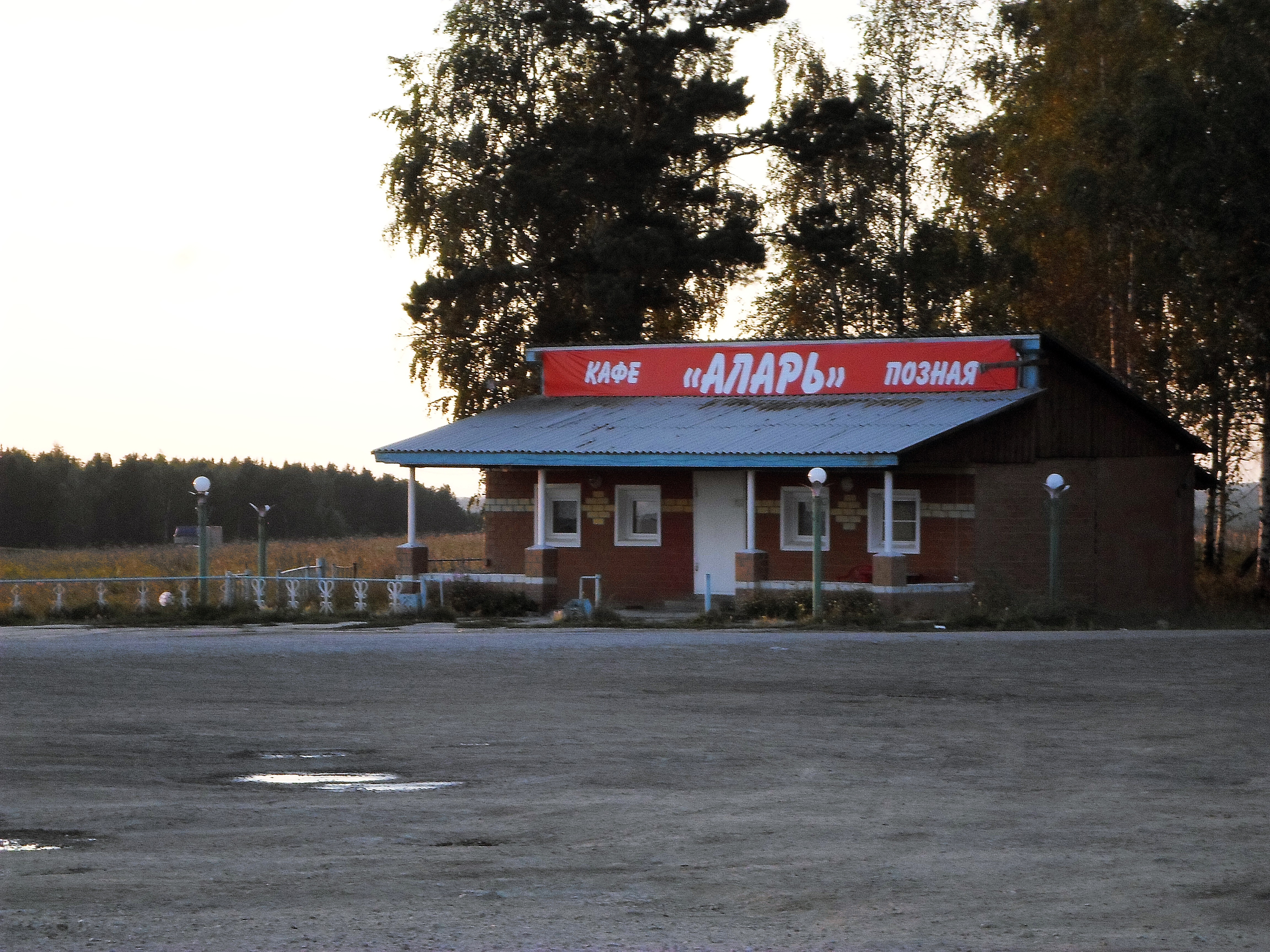 Придорожное кафе-позная к северу от Кутулика на трассе "Сибирь".